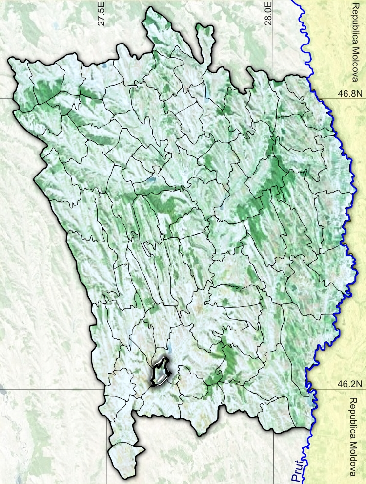 Barlad jud Vaslui